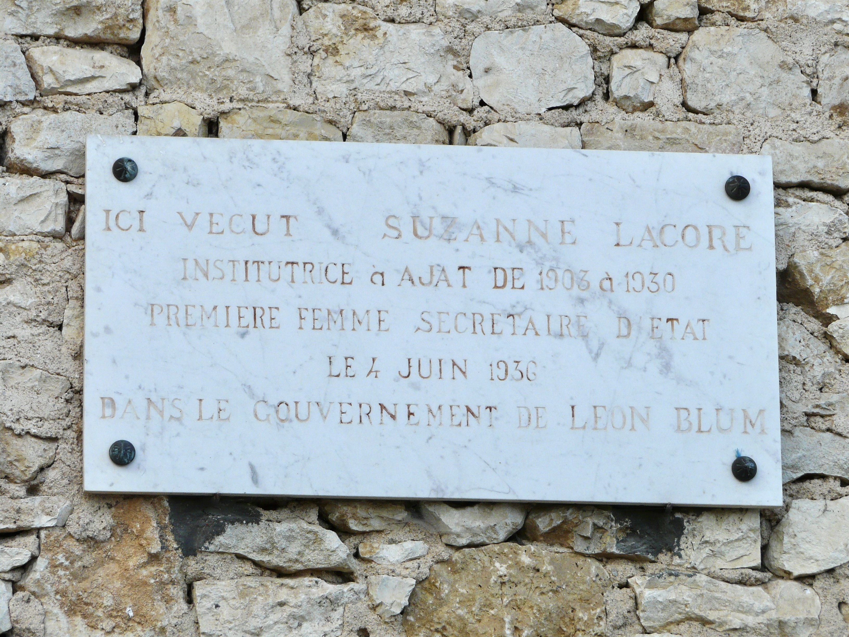 Plaque sur la maison où a vécu Suzanne Lacore, Ajat, Dordogne, France.